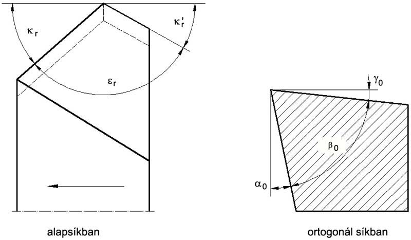 Élszögek